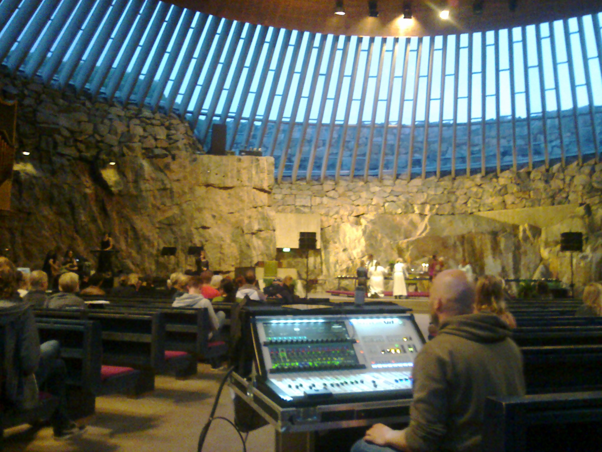 Metallimessu Temppeliaukion kirkossa